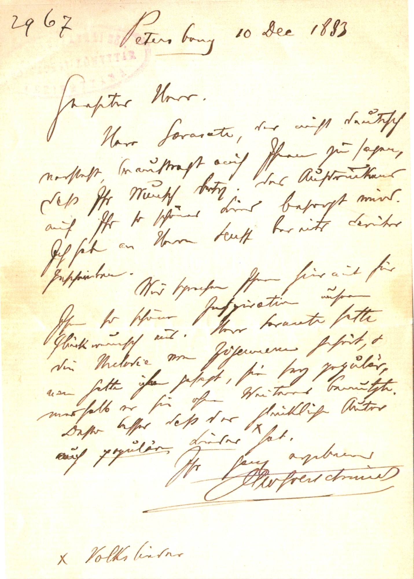 Otto Goldschmidt: Brief an Elemér Szentirmay am 10. Dezember 1883 wegen des Plagiats Sarasates in den ZigeunerweisenÜbertragung von Peter Jost: Petersburg, 10. Dec. 1883 Geehrter Herr, Herr Sarasate, der nicht deutsch versteht, beauftragt mich[,] Ihnen zu sagen, daß Ihr Wunsch betr[effs] des Aufdruckens auf Ihr so schönes Lied besorgt wird. Ich habe an Herrn Senff bereits darüber geschrieben. Wir sprechen Ihnen hiermit für Ihre so schöne Inspiration unseren Glückwunsch aus. Herr Sarasate hatte die Melodie von Zigeunern gehört, & man hatte ihm gesagt, sie sey populär, weshalb er sie ohne Weiteres benutzte. Desto besser daß der glückliche Autor auch populäre Lieder hat. Ihr ganz ergebener Otto Goldschmidt